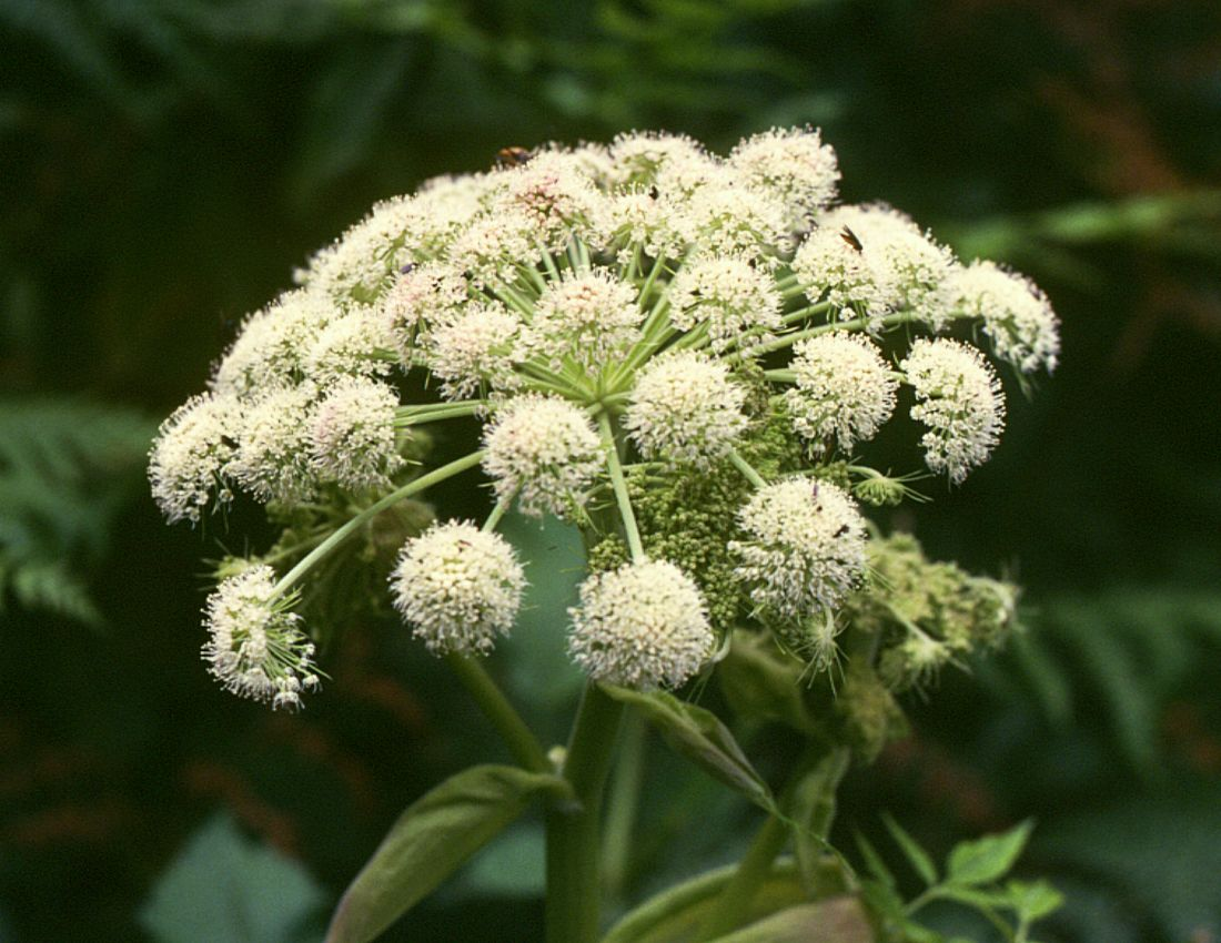 Wald-Engelwurz (Angelica sylvestris), Doldenblütler (Apiaceae) - Österreich/Austria/Autriche: Niederösterreich, Erlauftal E Gaming, unter Nestelberg